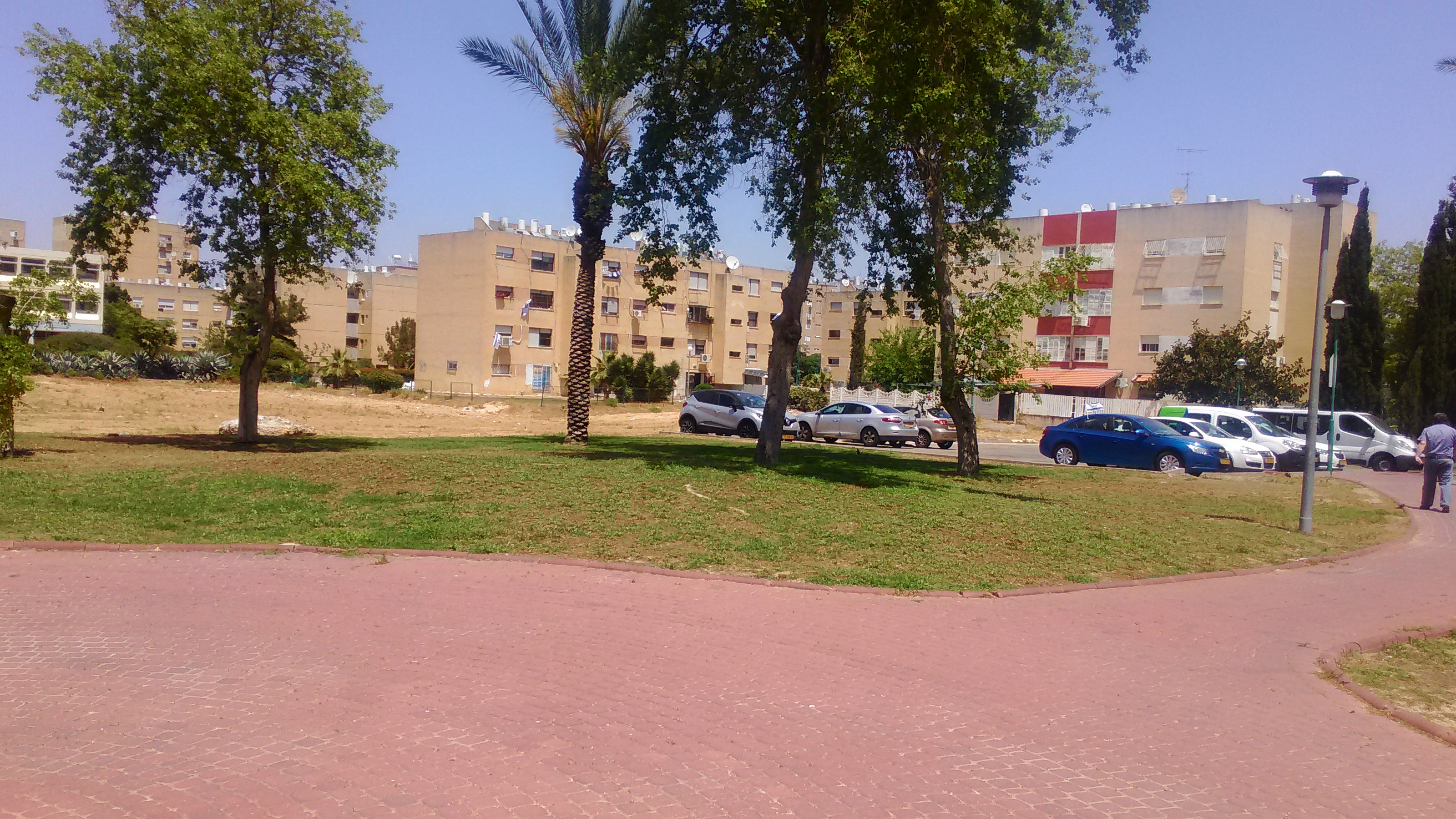 מבני מגורים בעיר